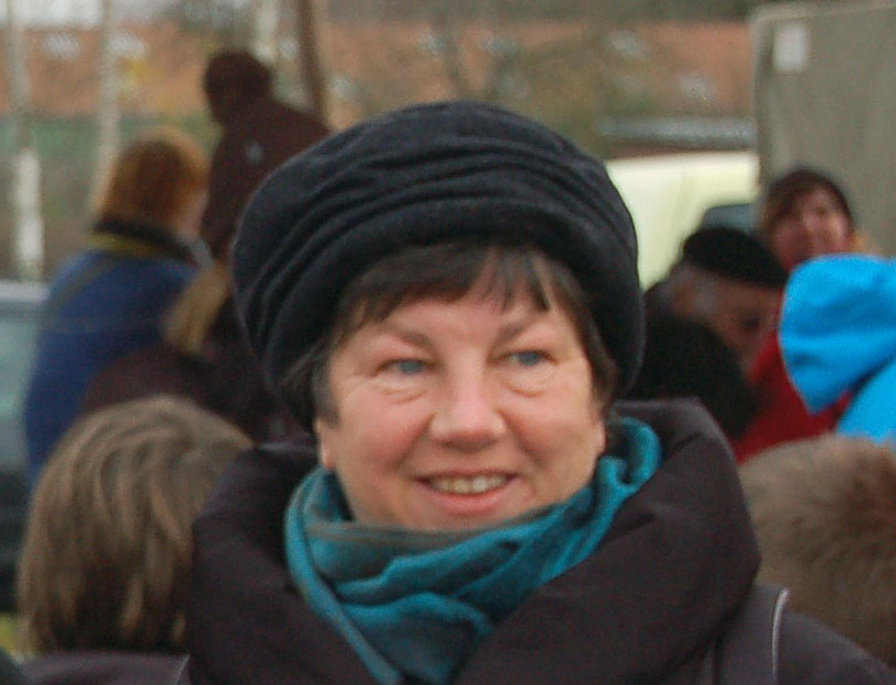 Heidrun Dittrich bei der "Stopp Castor - Gorleben soll leben" - Demonstration am 26.11.11